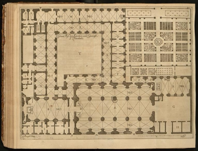 Grundriss des Gebäudekomplexes von St. Trinitatiskirche, St. Annenkirche und Franziskanerkloster in Danzig. Legende: A: Große Kirche, B: Hinter-Chor mit großem Altar, C: großer Altar, D: Orgel, E: kleine polnische Kirche, F: zwei Sakristeien G: Kirchhof, H: Wohnhäuser der Kirchenbedienten, I: Wohnhäuser der Schulbedienten, K: Kreuzgänge, L: großes Auditorium, M: Vorgewölbe des großes Auditoriums, N:kleines Auditorium, O: Bibliothek, P: Klassen der Prima, Sekunda, Tertia, Q: Treppe zum Kloster und Schlafhaus, R: medizinischer Graten, S: Garten der Herren Vorsteher, T: Garten zwischen den Kreuzgängen im Kloster, V: gewesene Communitat, W und X: Eingangstüren zur Großen Kirche, Y: Eingang in das Kloster und zu den Kreuzgängen, Z: Ausgang aus den Kreuzgängen. Je zwei Wendel- Treppen in der Großen Kirche und im Hinter-Chor.